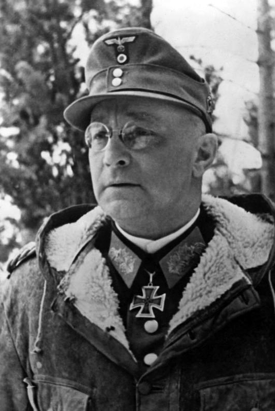 Franz Böhme General der Infanterie Böhme, Kommandierender General eines AK an der Lappland -Front. PK-Aufnahme: Kriegsberichter Umbach März 43 2037-43 Abgebildete Personen: Böhme, Franz: General, Ritterkreuz (RK), Heer, Deutschland (GND 124301983)